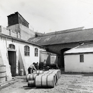 sin descripción